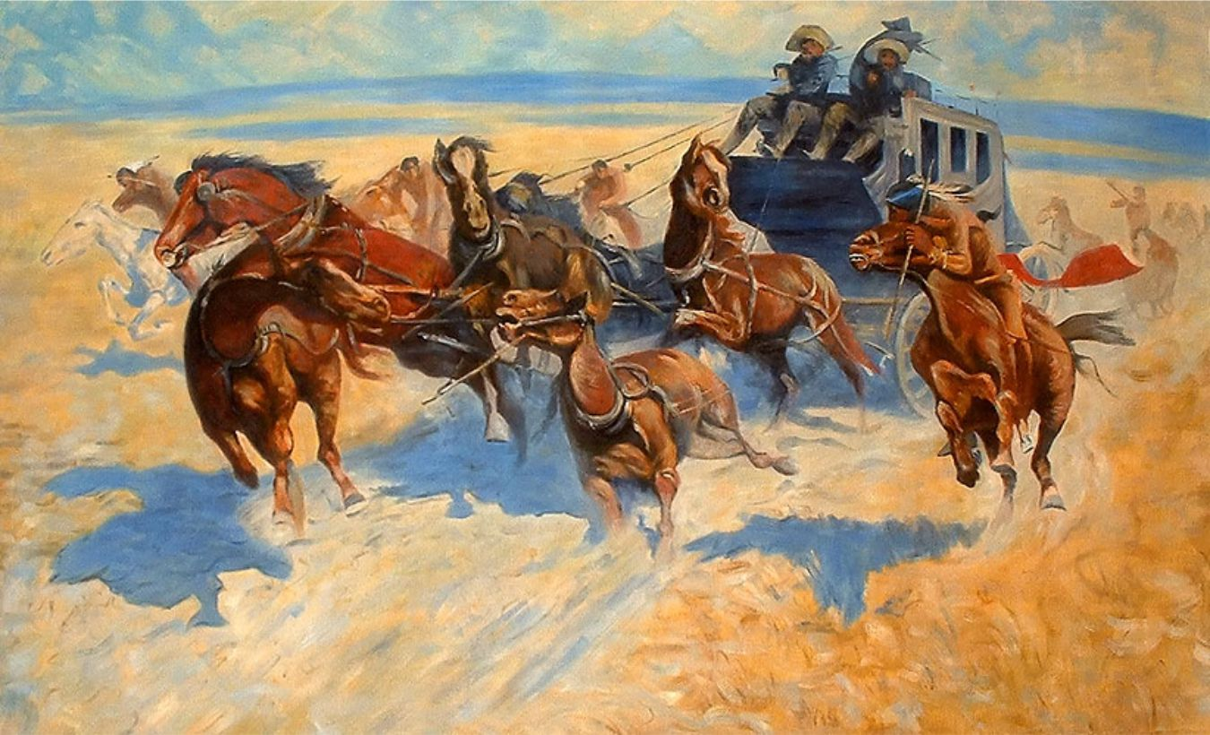 Oil painting